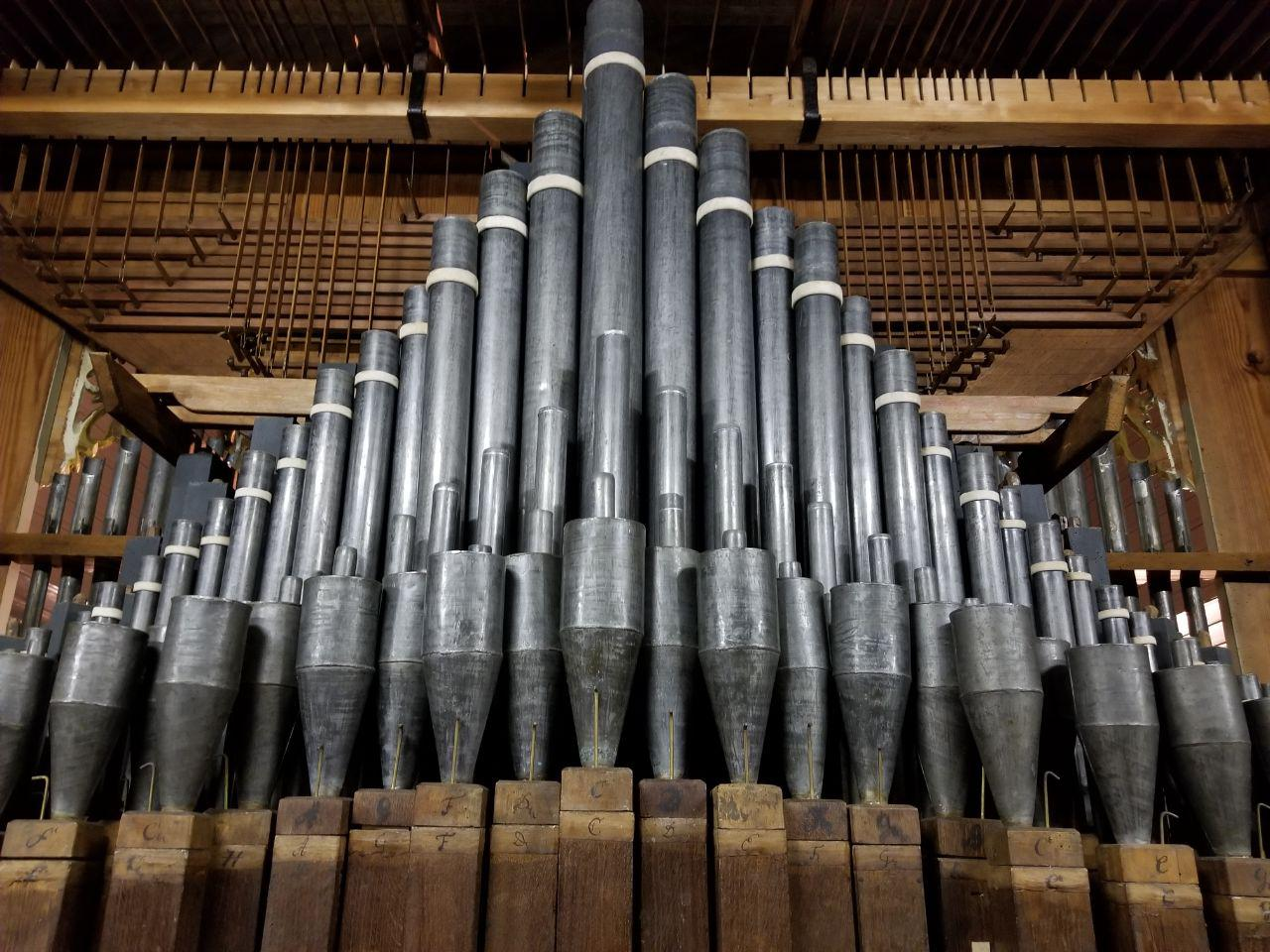 Feldsteinkirche Trebel. Die Orgelpfeifen der Georg-Stein-Orgel